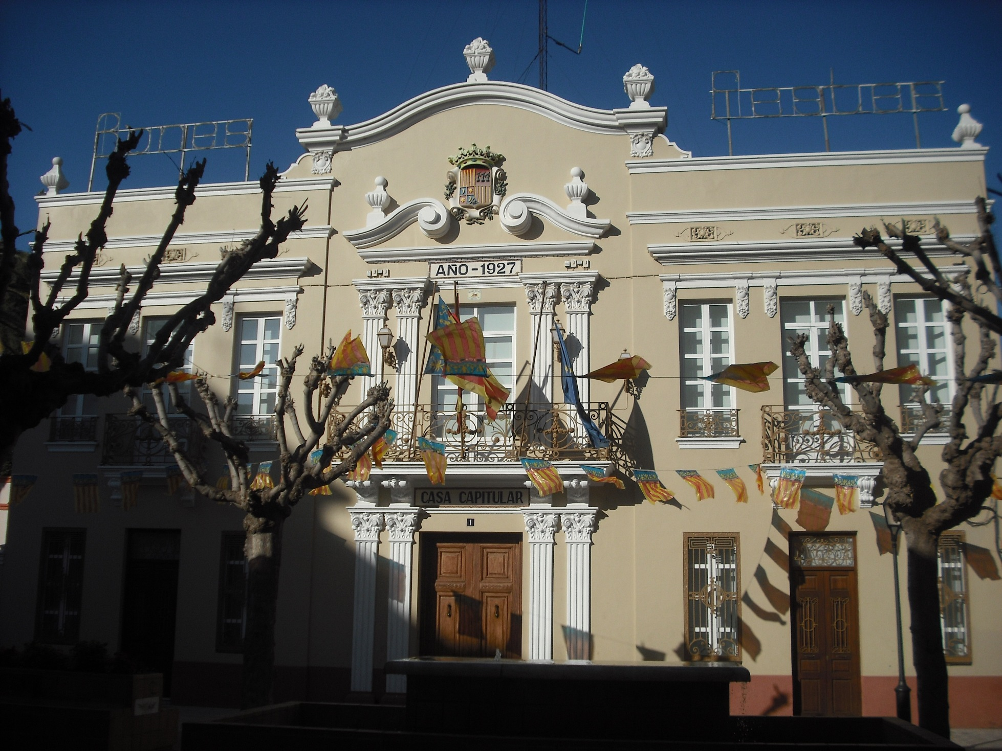 Ajuntament de Tavernes Blanques